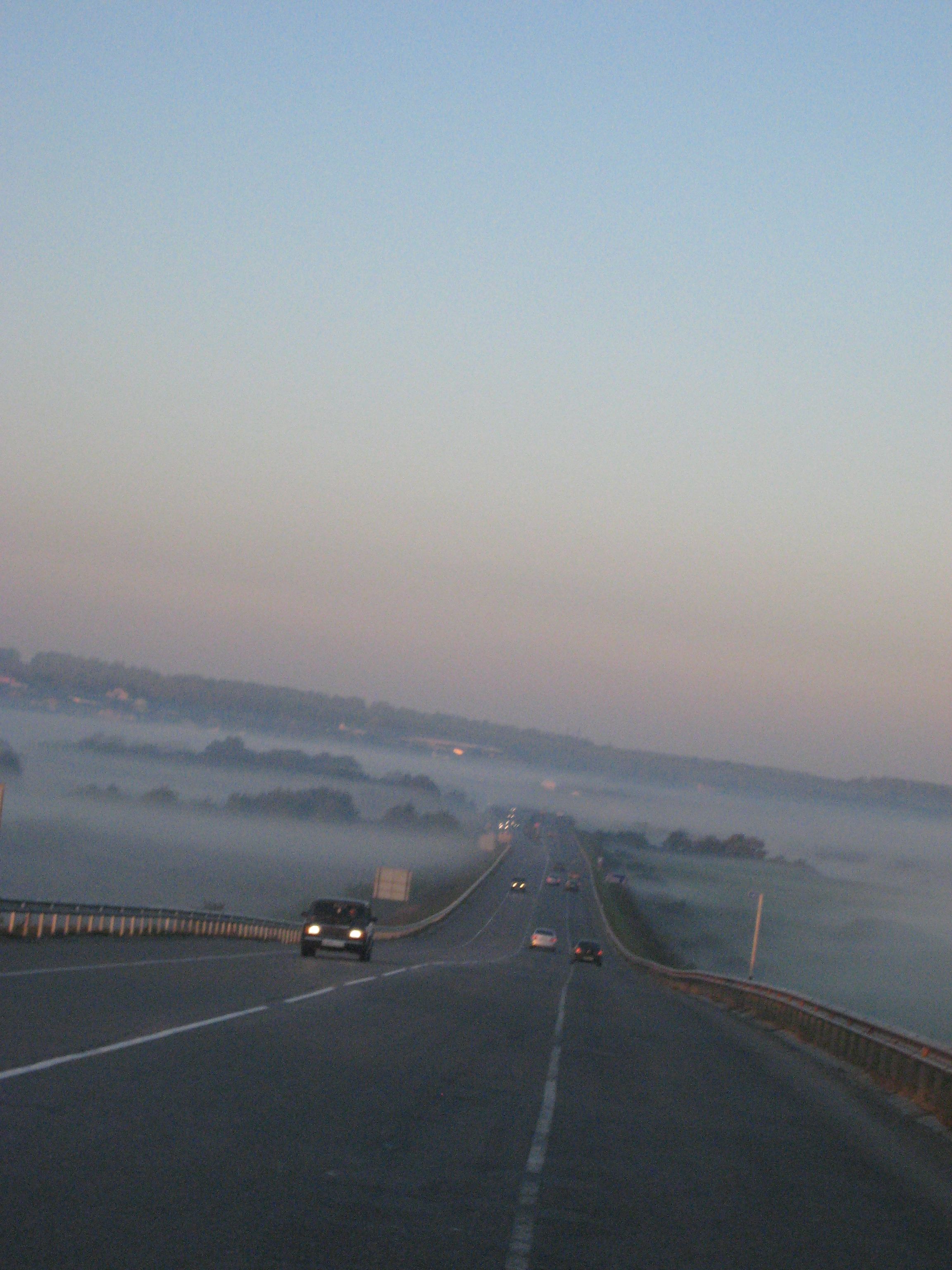 182 километр Симферопольского шоссе, Тульская область.